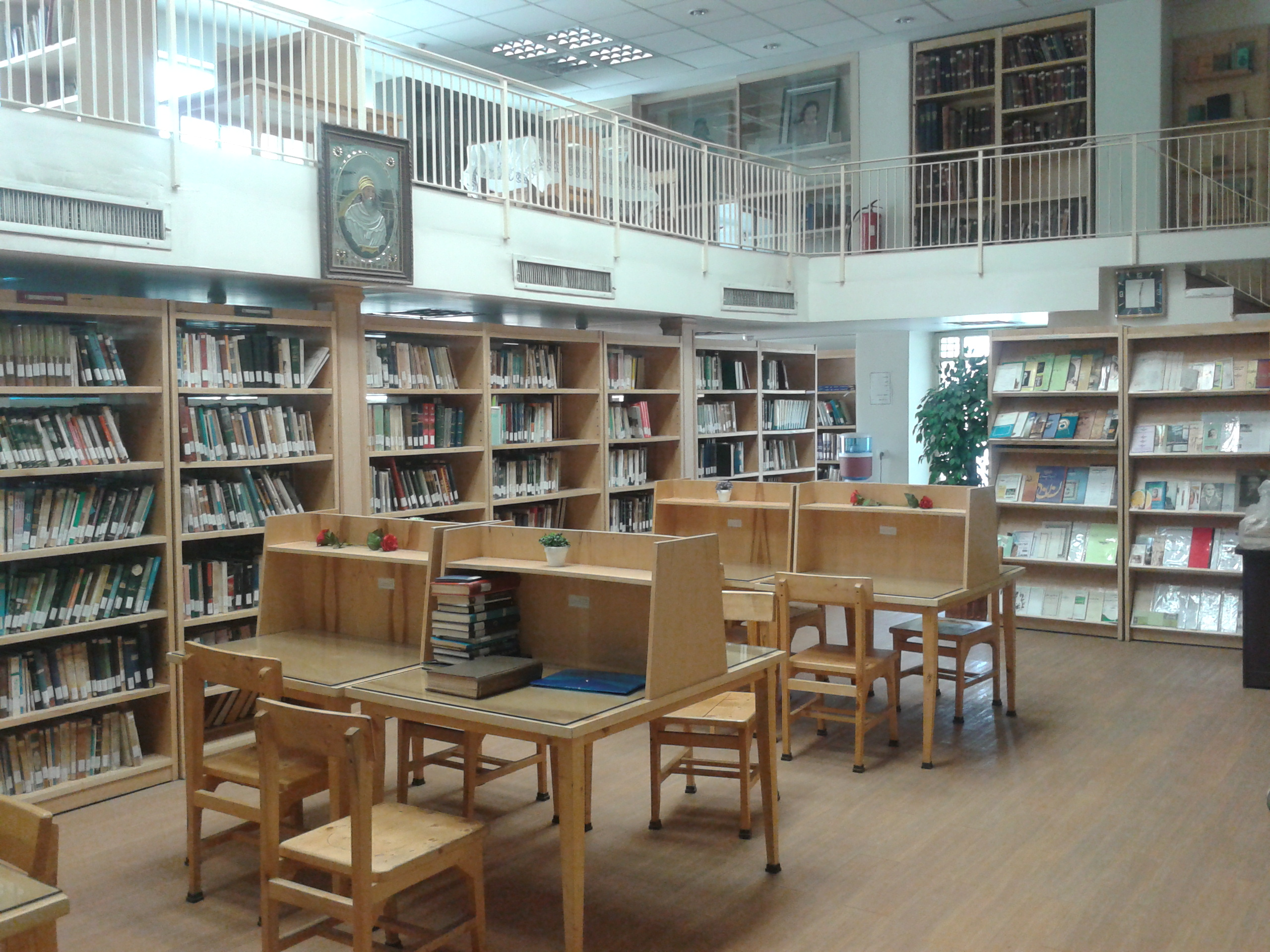 کتابخانه یگانگی